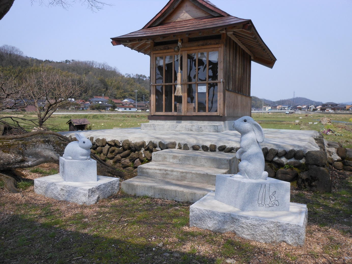 八上 八頭町 福本 白兎神社